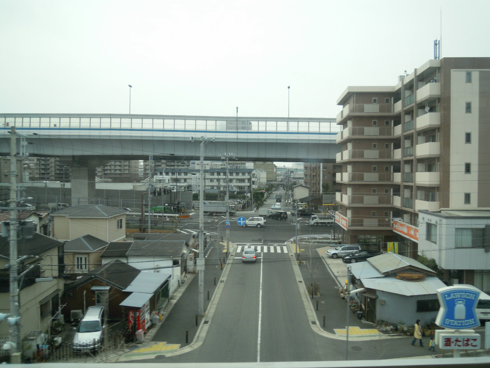 Uozaki Nishimachi